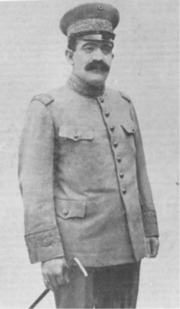 General Pablo González Garza